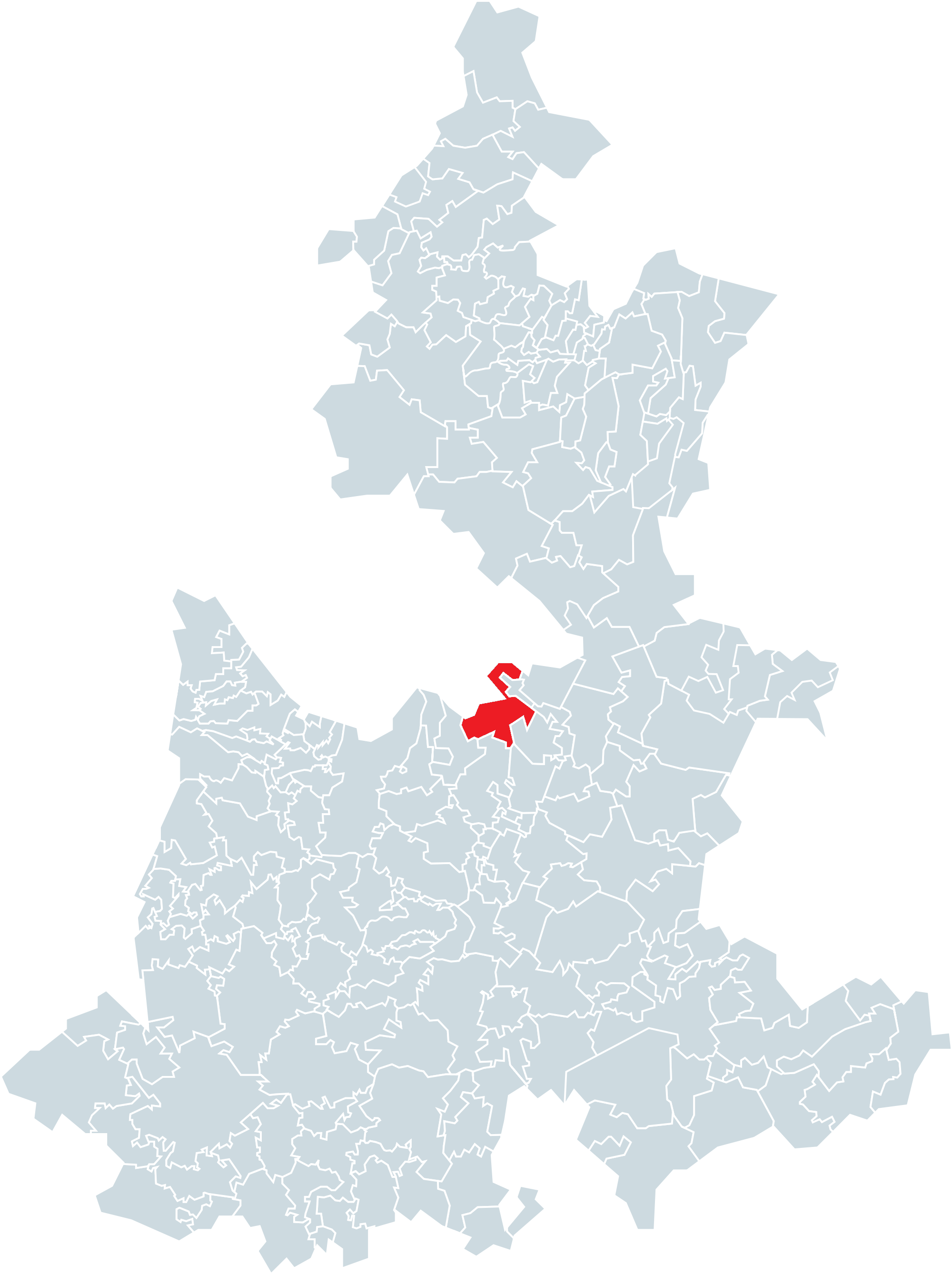 Municipio de Nopalucan